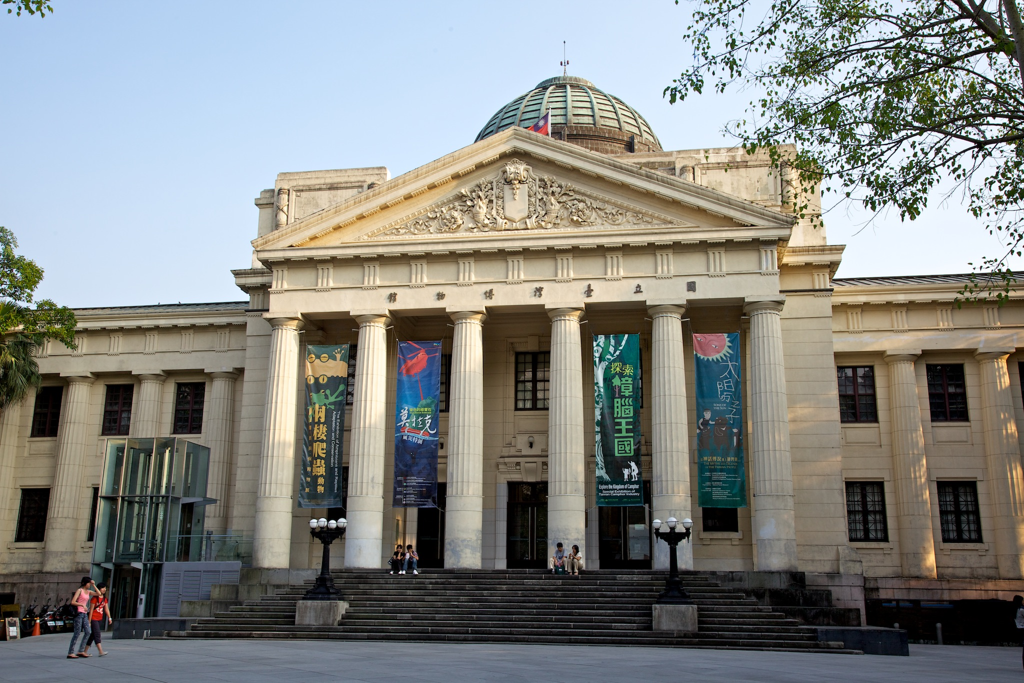 位於新公園內，其前身為日據時期的「兒玉總督後藤民政長官紀念館」，現為國定古蹟。